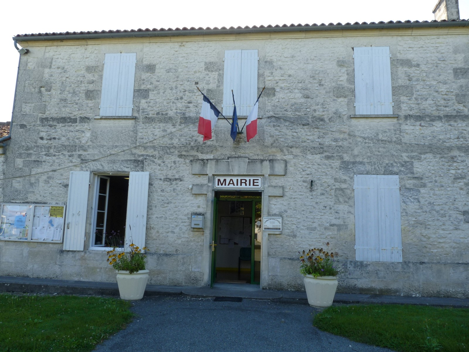 Mairie de Coulonges, Charente-Maritime, France